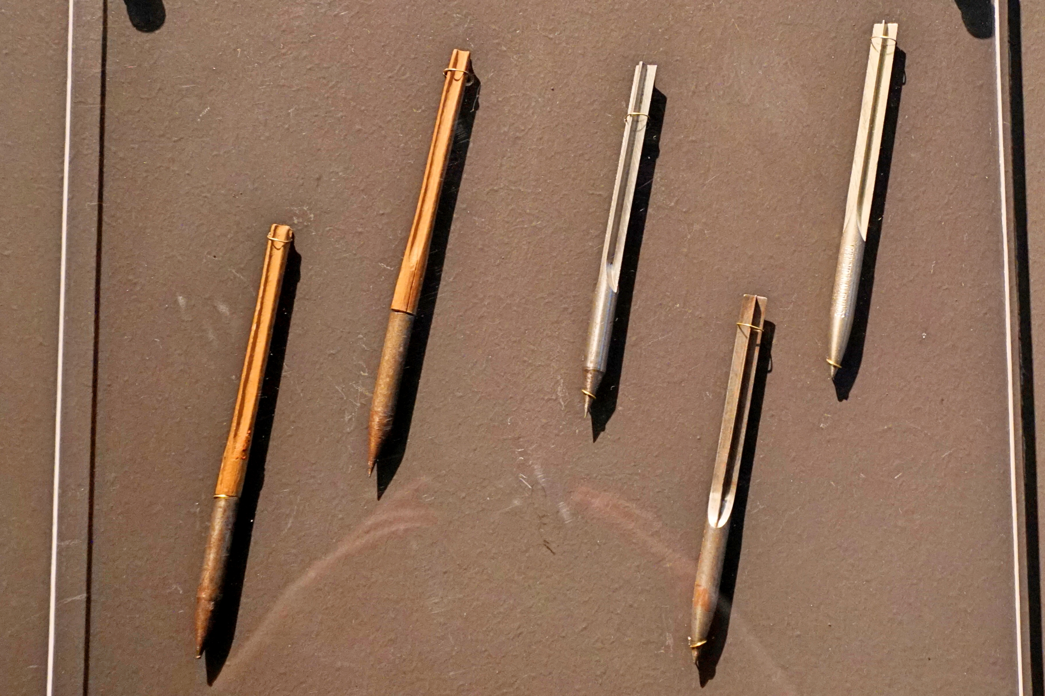 Fliegerpfeile, 1914 - 1918